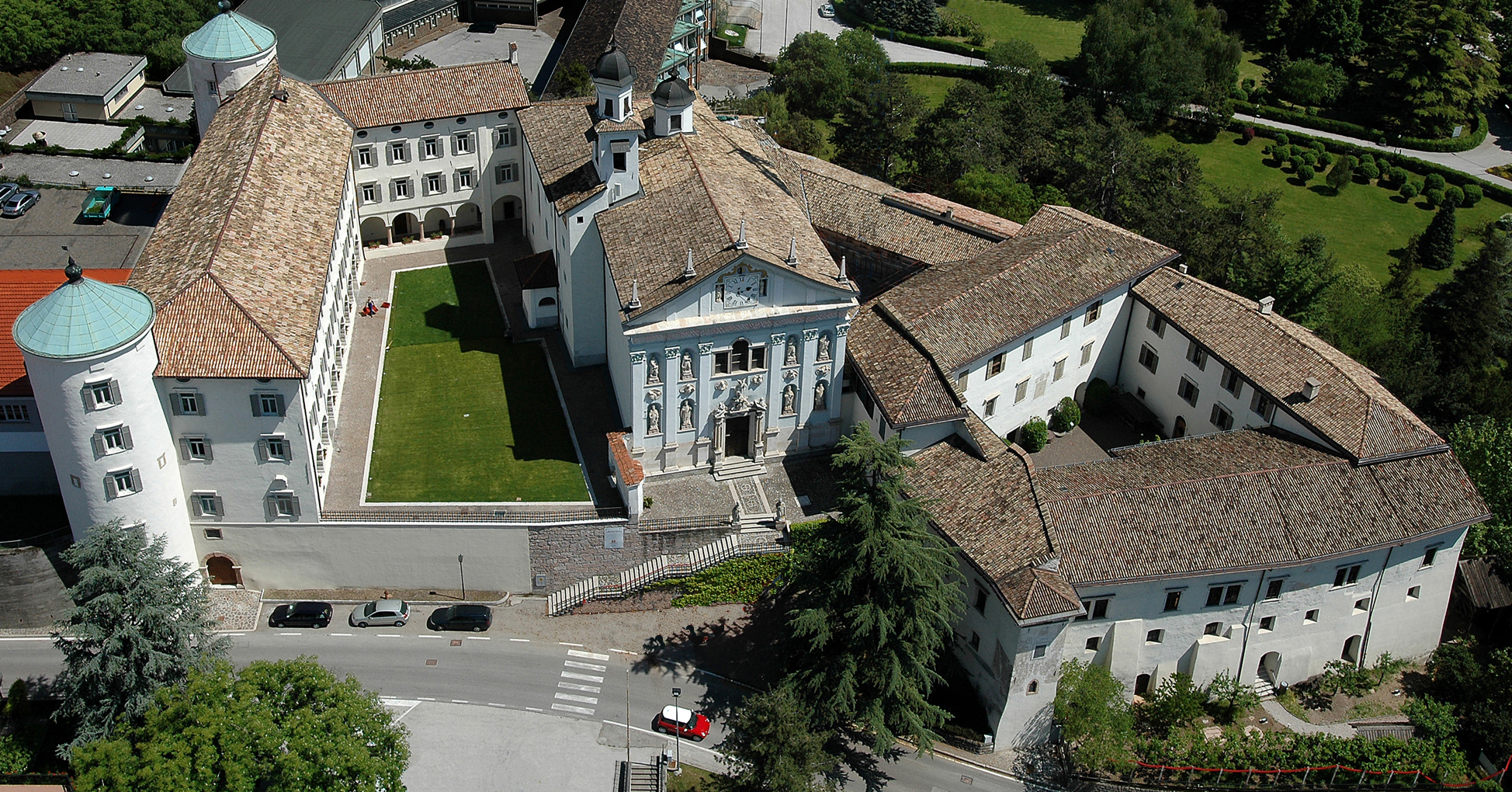 Foto aerea del complesso monumentale di San Michele all'Adige, sede del Museo degli Usi e Costumi della Gente Trentina, degli uffici e della cantina della Fondazione Edmund Mach